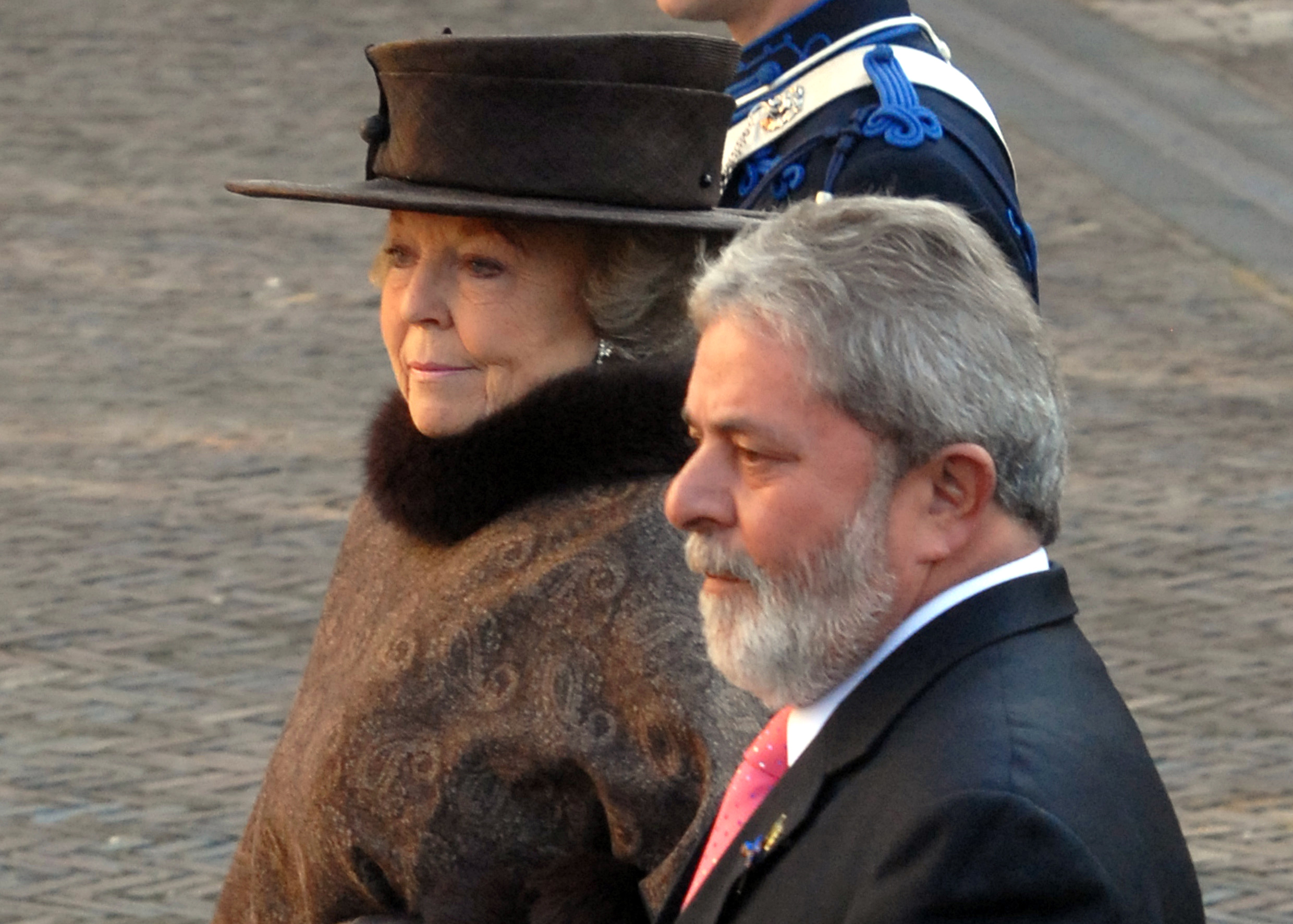 O presidente brasileiro Luiz Inácio Lula da Silva sendo recebido pela rainha Beatriz dos Países Baixos no palácio Noordeinde.